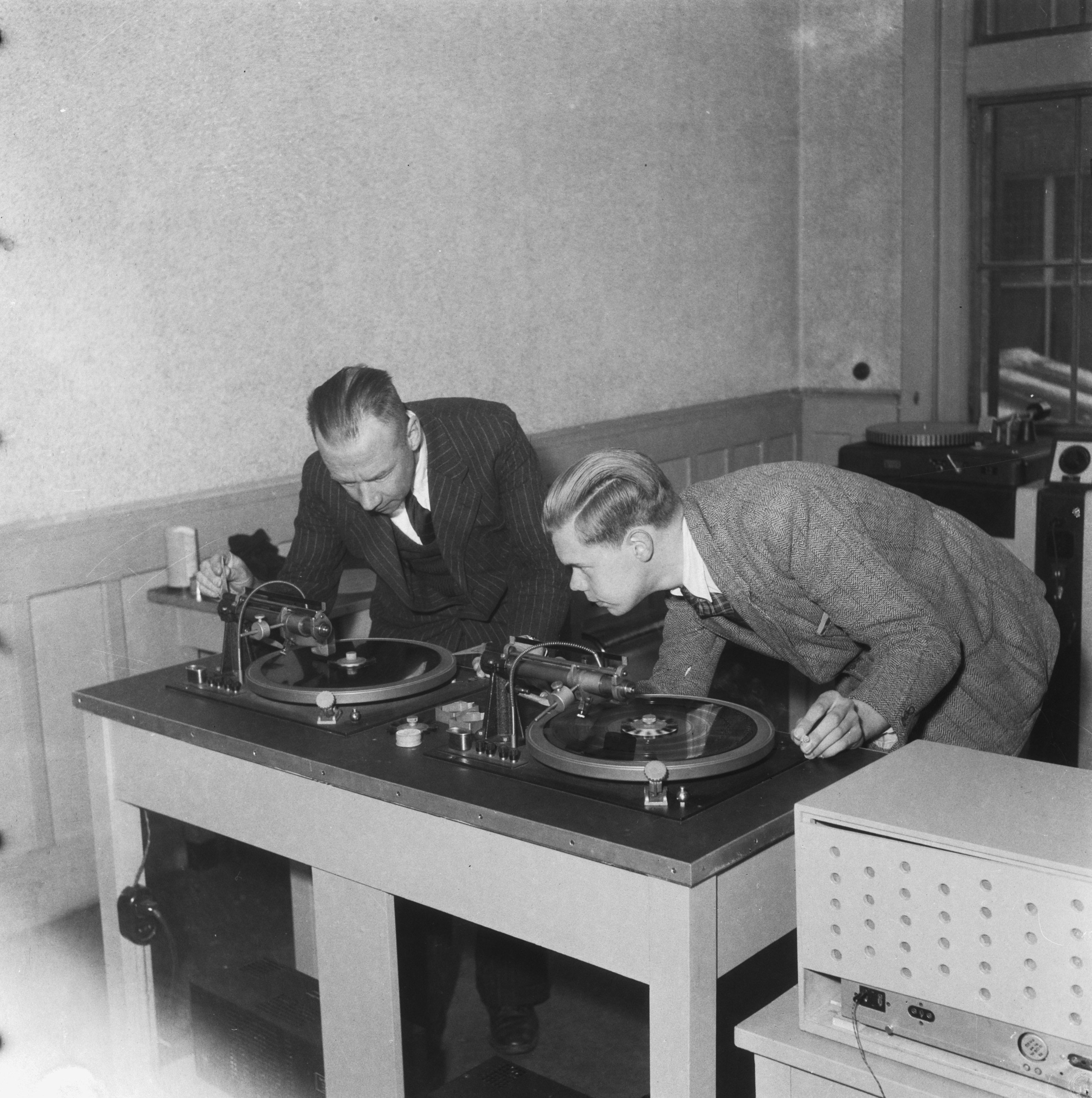 Collectie / Archief : Fotocollectie Anefo Reportage / Serie : Herrijzend Nederland Beschrijving : Reportage "Herrijzend Nederland" Annotatie : Medewerkers van Radio Herrijzend Nederland bij grammofoonplatenmachine? Datum : 2 november 1945 Locatie : Eindhoven Trefwoorden : radio, voorlichting Instellingsnaam : Radio Herrijzend Nederland Fotograaf : Ham, Piet van der / Anefo, [onbekend] Auteursrechthebbende : Nationaal Archief Materiaalsoort : Negatief (zwart/wit) Nummer archiefinventaris : bekijk toegang 2.24.01.03 Bestanddeelnummer : 901-0135